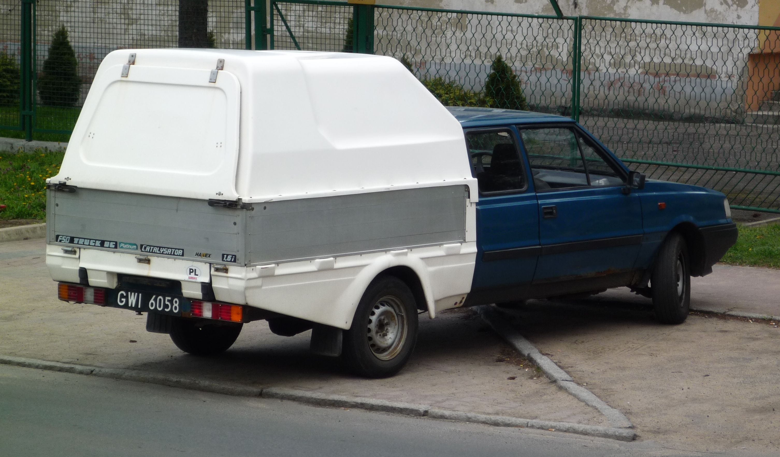 FSO Polonez Truck DC 1.6 i w Słubicach.